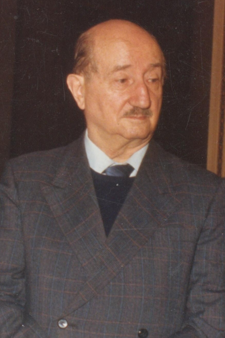 1985 (5-6) Oreste Plath y Roque Esteban Scarpa. Club de la Union